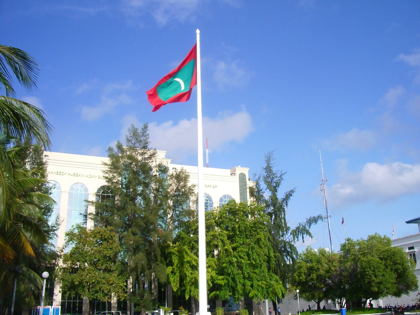 Giant flag, bandera gegant a la plaça central del port de Male, Illes Maldives; foto feta per J. Ollé el juliol del 2006.